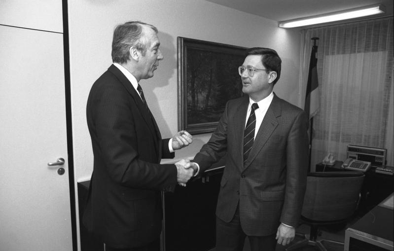 15.01.1988 Parteistaatssekretär Carl-Dieter Spranger erhält das Goldene Mehrkampfabzeichen des Deutschen Leichtathletik-Verbandes (DLV), überreich von DLV-Präsidenten Dr. Eberhard Münzert - Im Bundesministerium des Innern.